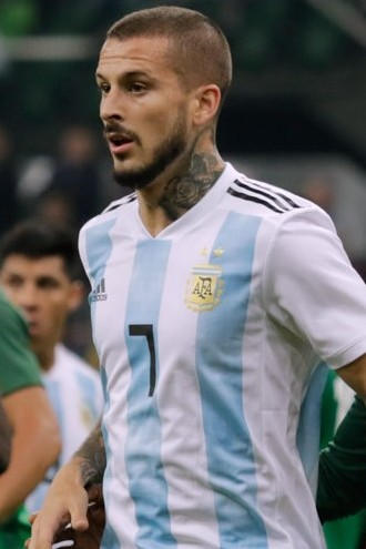 Darío Benedetto, Kenneth Omeruo